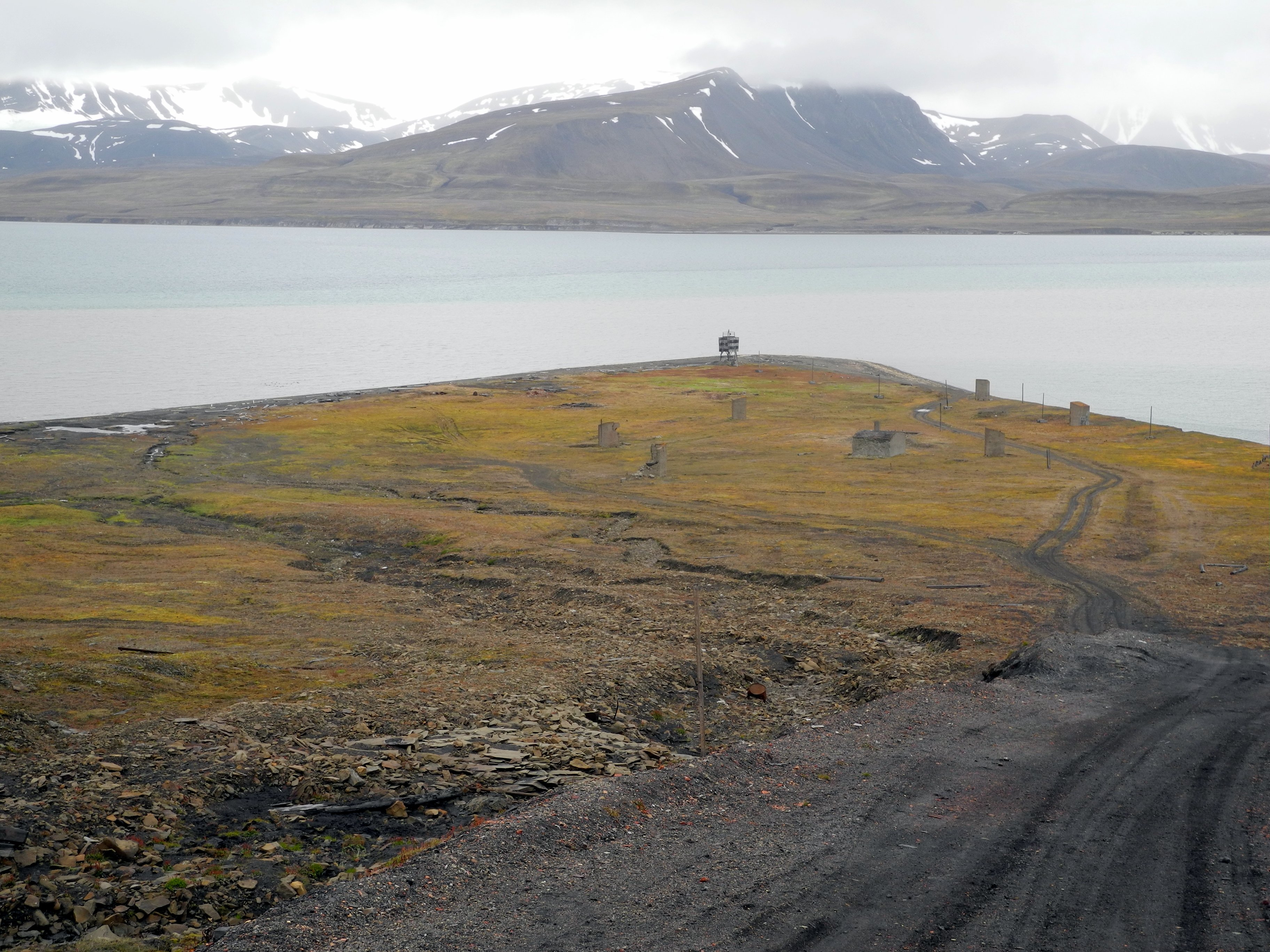 Finneset, a peninsula in the Grønfjorden near Barentsburg.